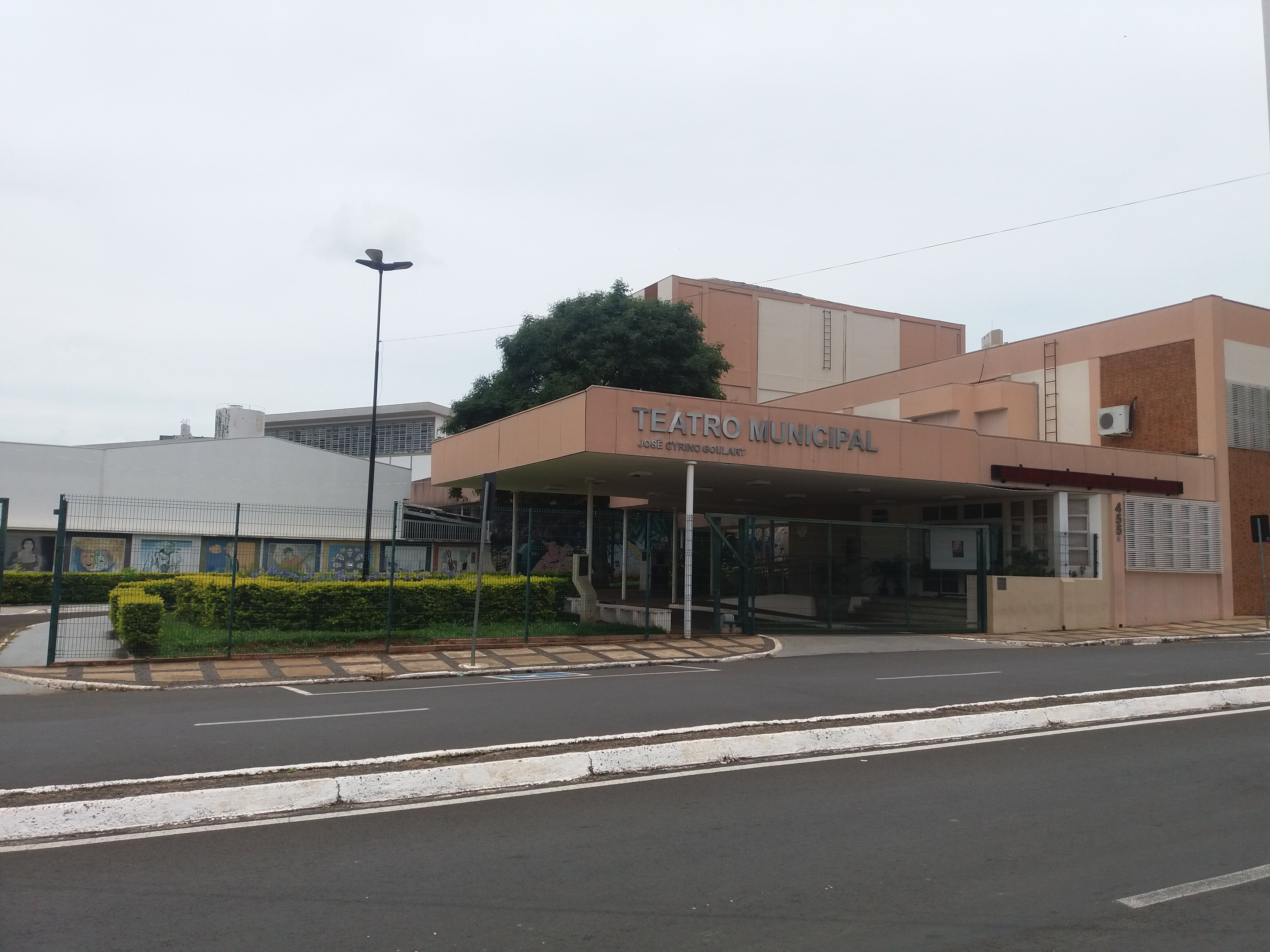 Teatro Municipal "José Cyrino Goulart', Franca (SP), Brazil